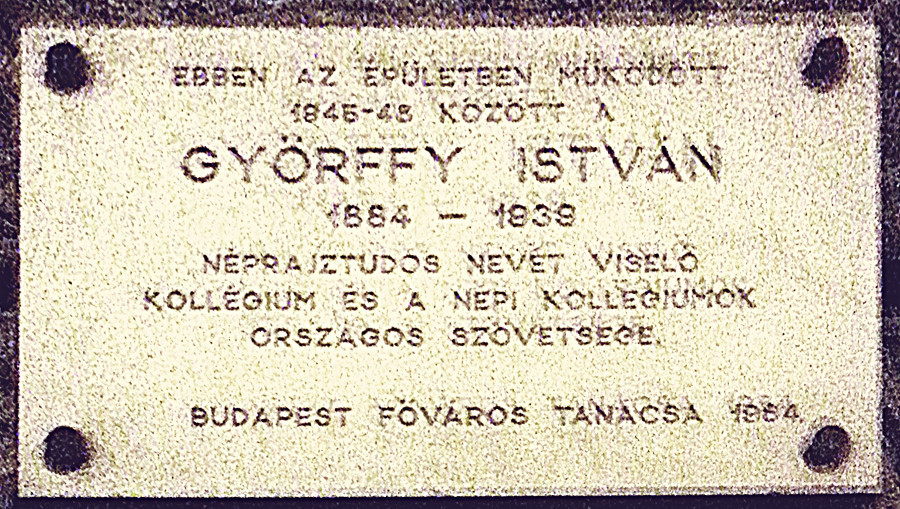 Györffy István emléktáblája, Budapest V. kerület, Ferenciek tere 2.